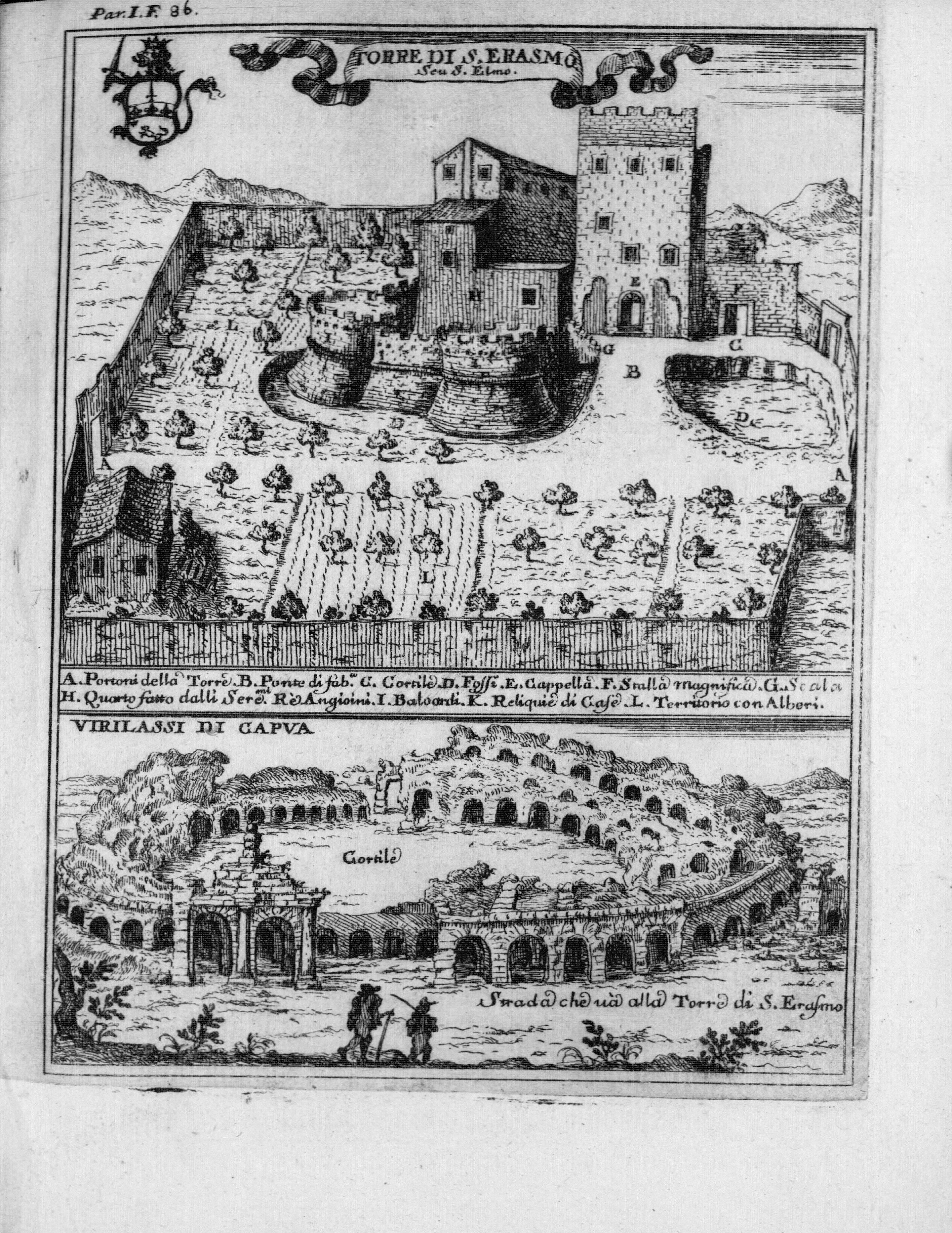 Autor: Pacichelli, Giovanni Battista, 1641-1702 Descripción bibliográfica: Il regno di Napoli in prospettiva : diviso in dodeci provincie, in cui si descrivono la sua Metropoli Fidelissima città di Napoli ... Opera postuma divisa in tre parti / dell'abatte Gio. Battista Pacichelli ; Parte prima [-terza] ... Del regno di Napoli in prospettiva / dell'abate Pacichelli. Parte prima. - In Napoli : nella Stamperia di Michele Luigi Mutio, 1703. - v. : principalmente il.; 4º . - Inic. adorn. y frisos dec. - Grab. calc. y h. pleg. grab. calc. de mapas de Cassianus de Silva. Ilustrador: Cassiano De Silva, Francesco, il. Impresor: Muzio, Michele Luigi, imp. Lugar de impresión: Italia. Nápoles -Localización: Vea la ilustración en su contexto